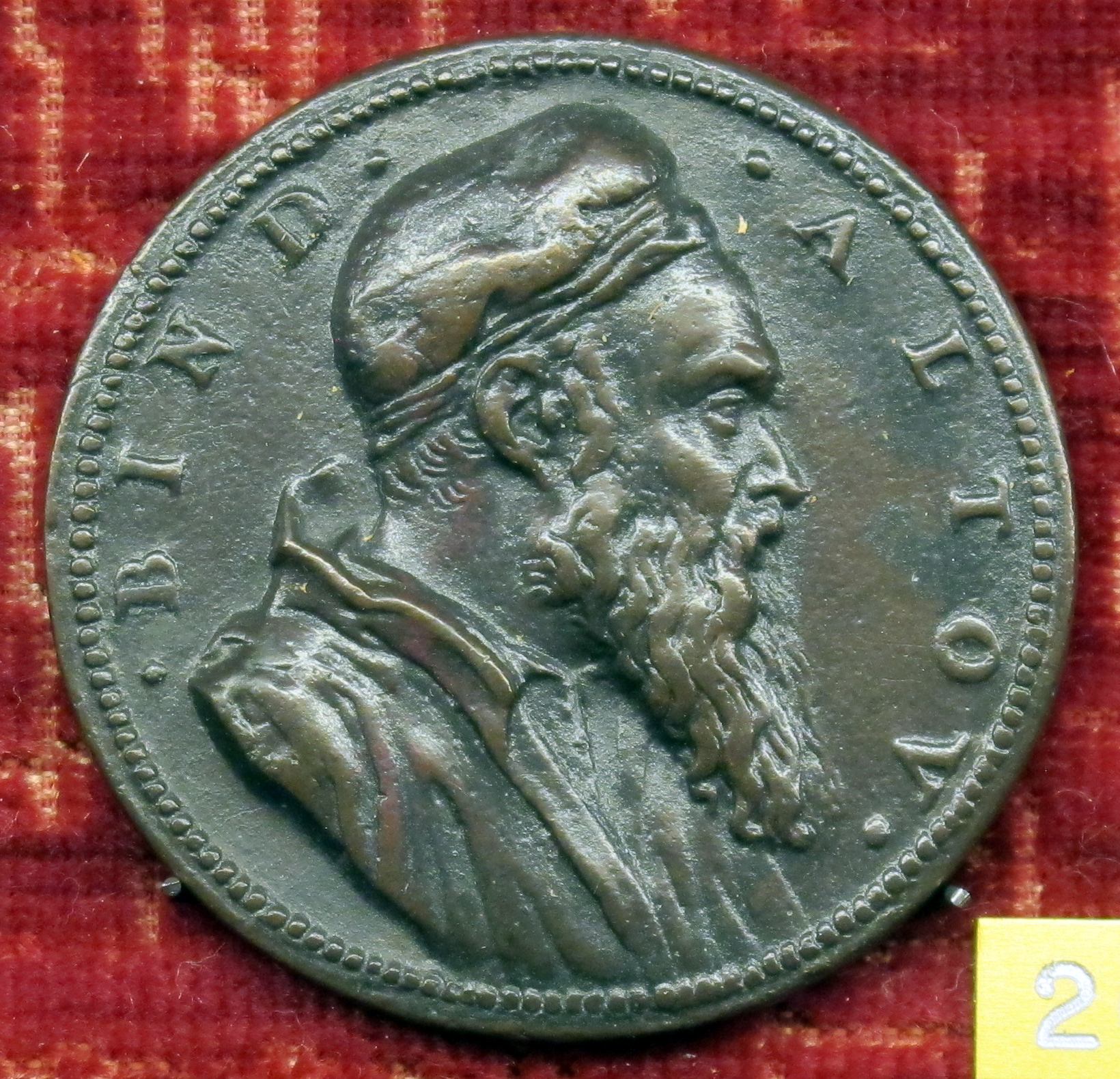 Medaglia di Bindo Altoviti, recto